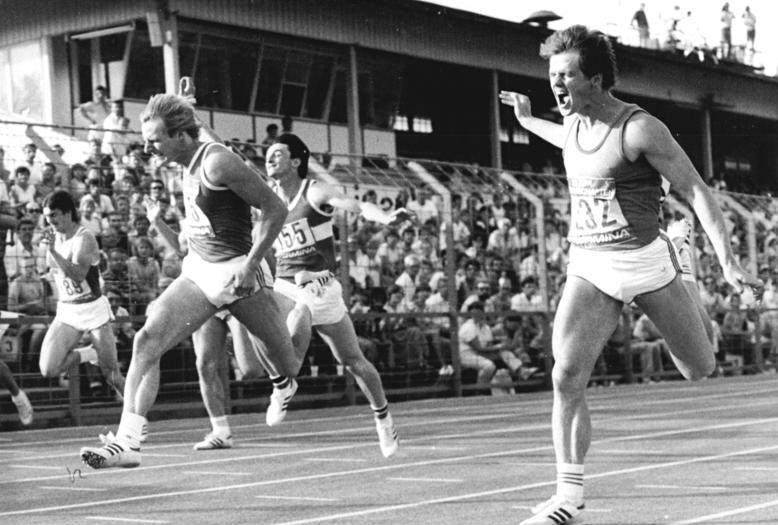 Thomas Schröder, Steffen Bringmann ADN-ZB Kluge 27.6.86 Bez. Gera: 37. DDR-Meisterschaften der Leichtathleten in Jena - Thomas Schröder (SC Neubrandenburg, r.) wurde auf dem Jenaer Ernst-Abbe-Sportfeld in 10,10 s Meister im 100-m-Lauf vor Steffen Bringmann (SC DHfK Leipzig,vorn l.).